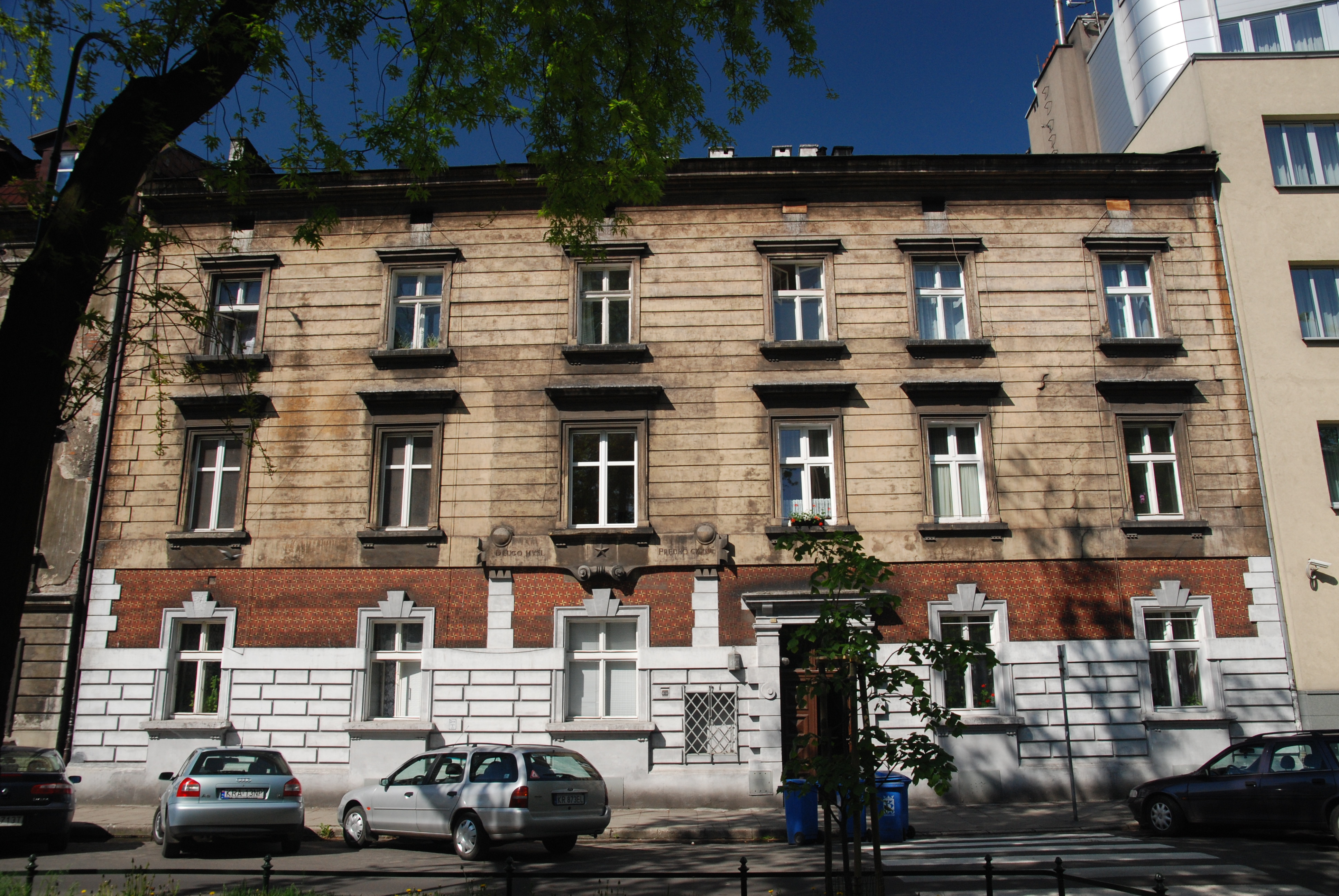 Dom proj. Teodor Talowski, ul. Retoryka 15, Kraków